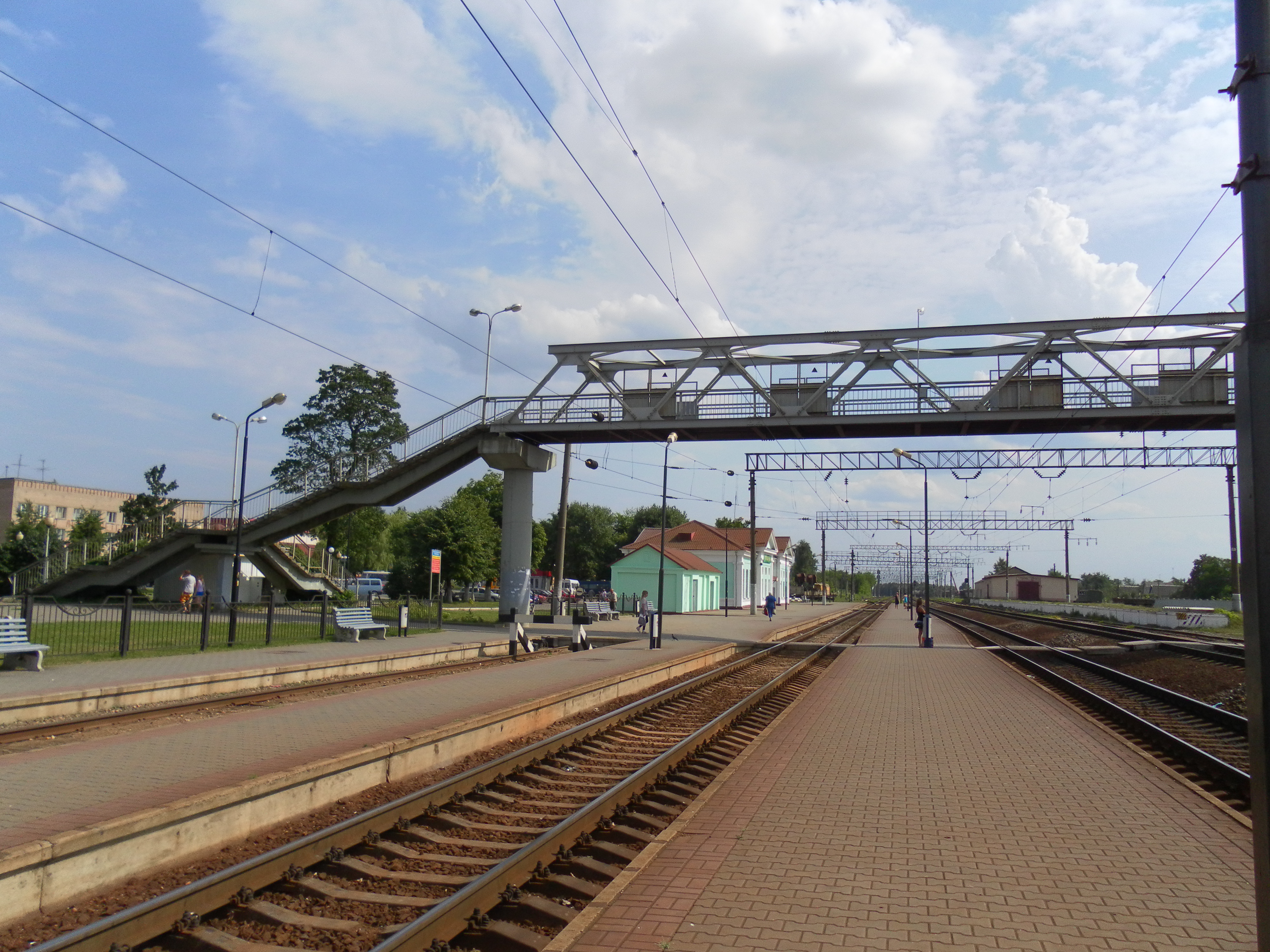 ж/д вокзал в Марьиной Горке.